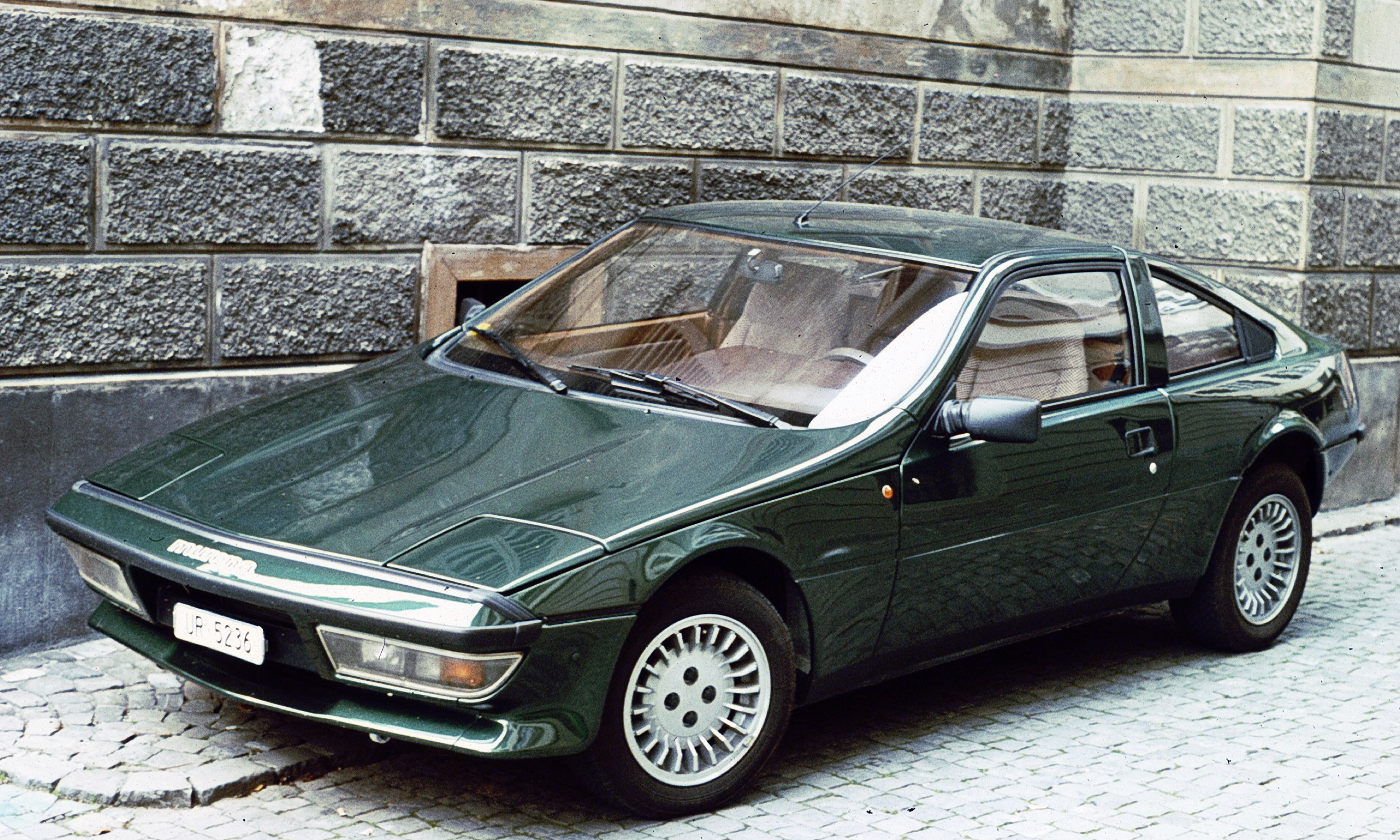 Matra Murena 2200 1981 en Suisse